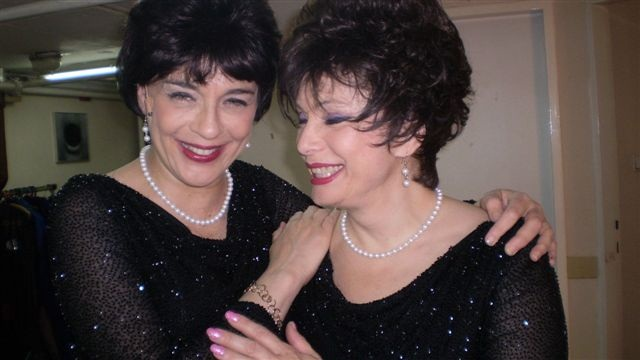 מוניקה ורדימון וענת עצמון בסיבוב הופעות באיטליה עם ההצגה אחיות פארי של תיאטרון יידישפיל